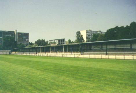 Stadion des NK Hrvatski Dragovoljac Zagreb/Autor: Danijel Majic